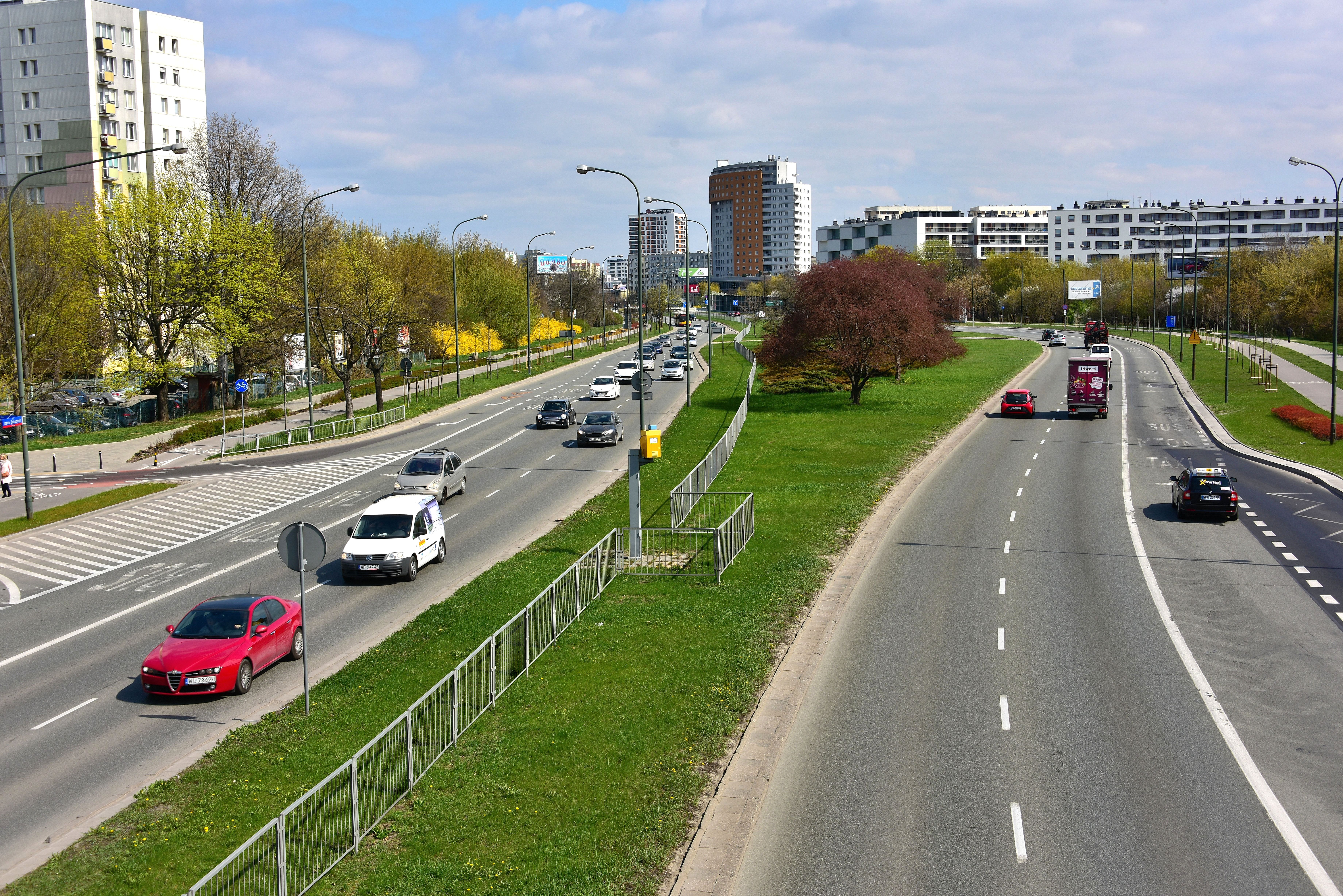 Aleja Stanów Zjednoczonych na wysokości ul. Międzynarodowej